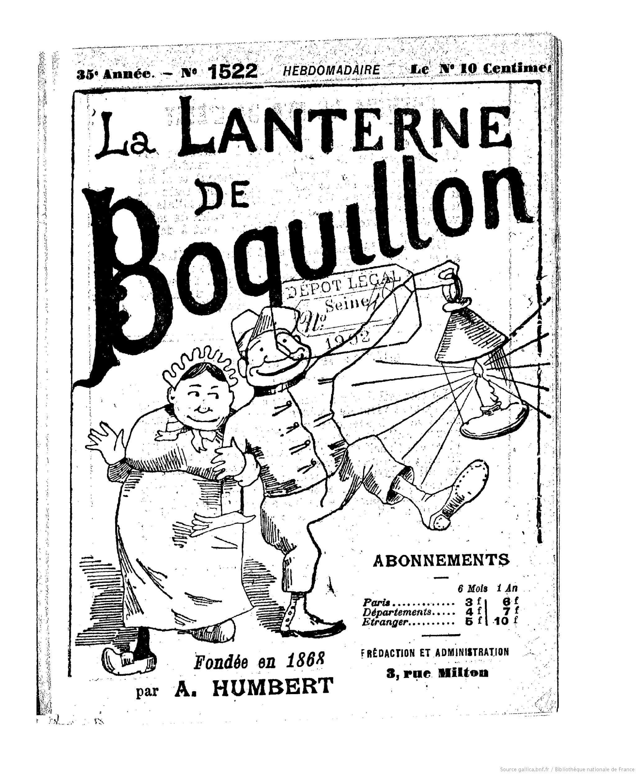 La Lanterne de Boquillon (première page du n°1522 du 5 octobre 1902